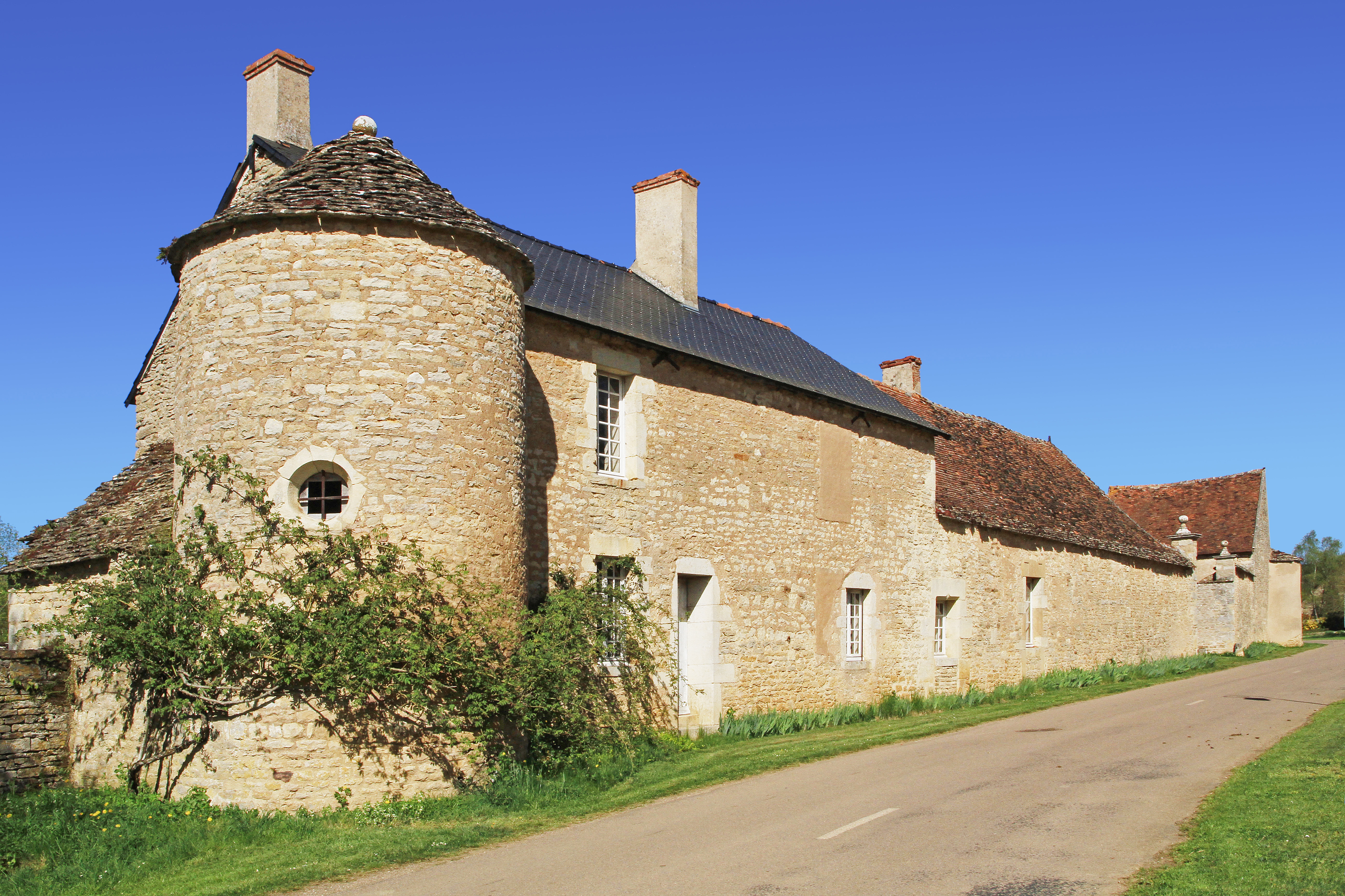 Dépendances du château de Missery